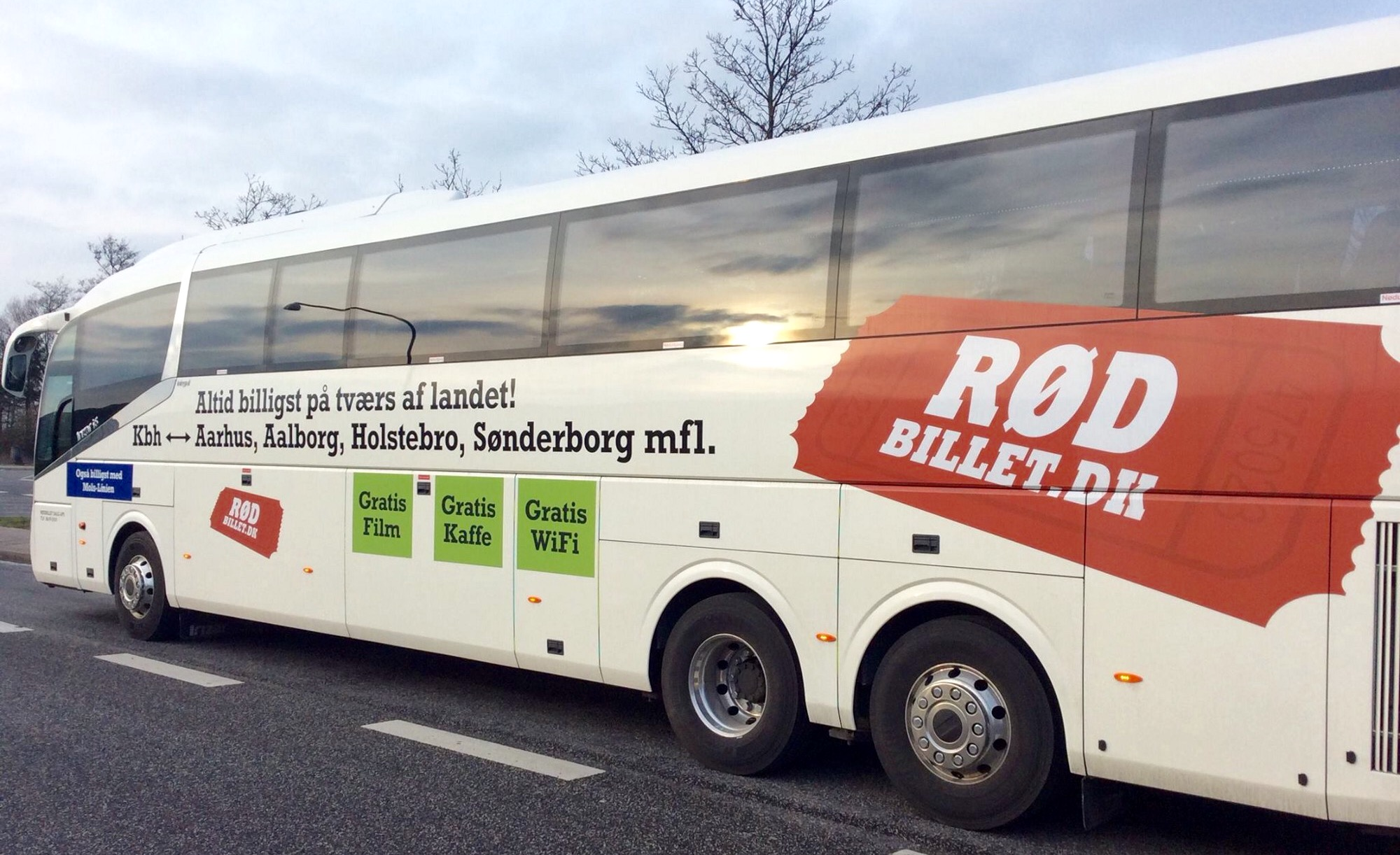 Bus fra Rødbillet.dk under en pause på rasteplads på Fyn.